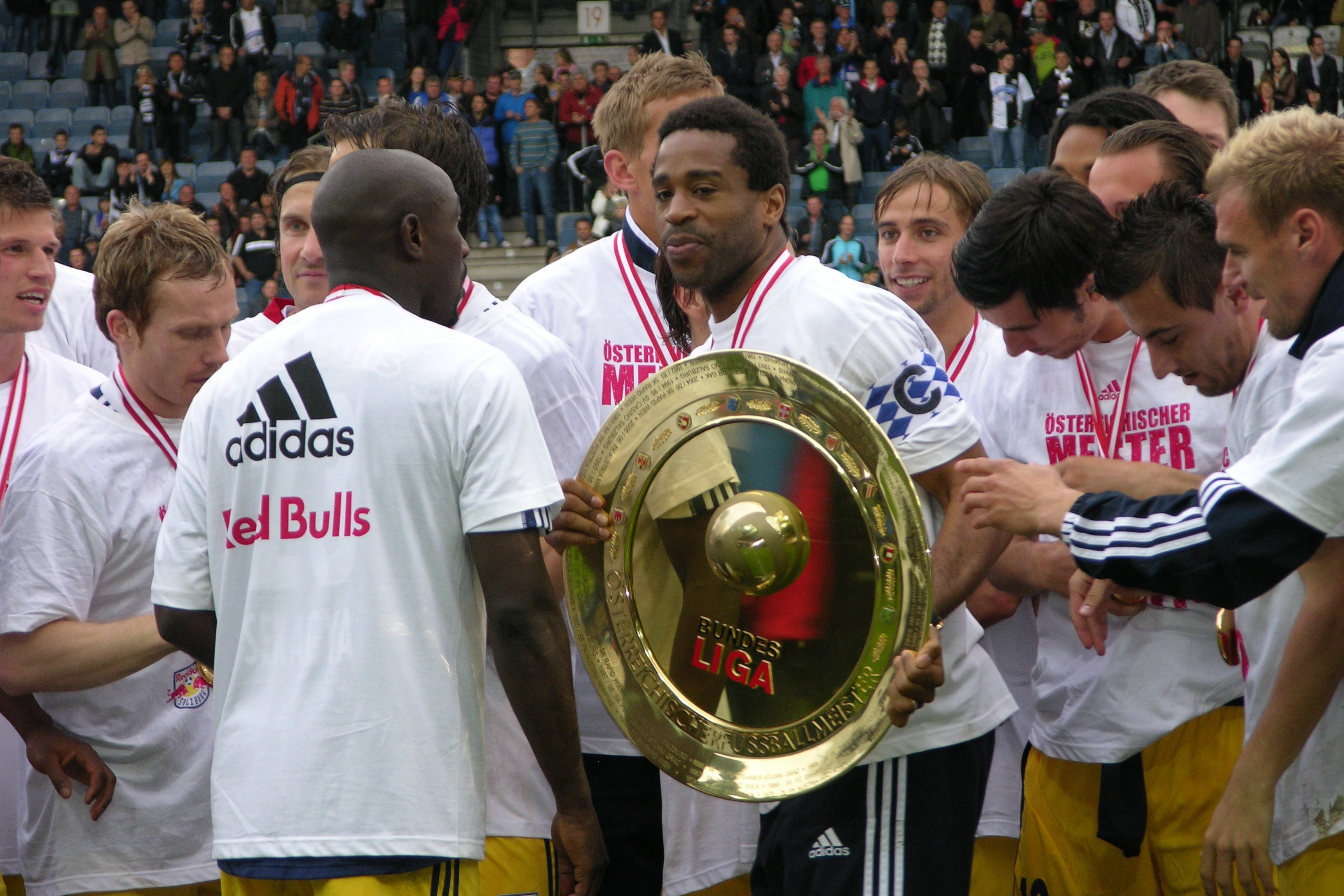 Bundesligameisterschaftsfinale 2009/2010 Sturm : Salzburg